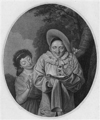 Scène galante, gravé par Jacques-Louis Copia (1764-1799) d'après le peintre Louis Marie Sicard (1743-1825).